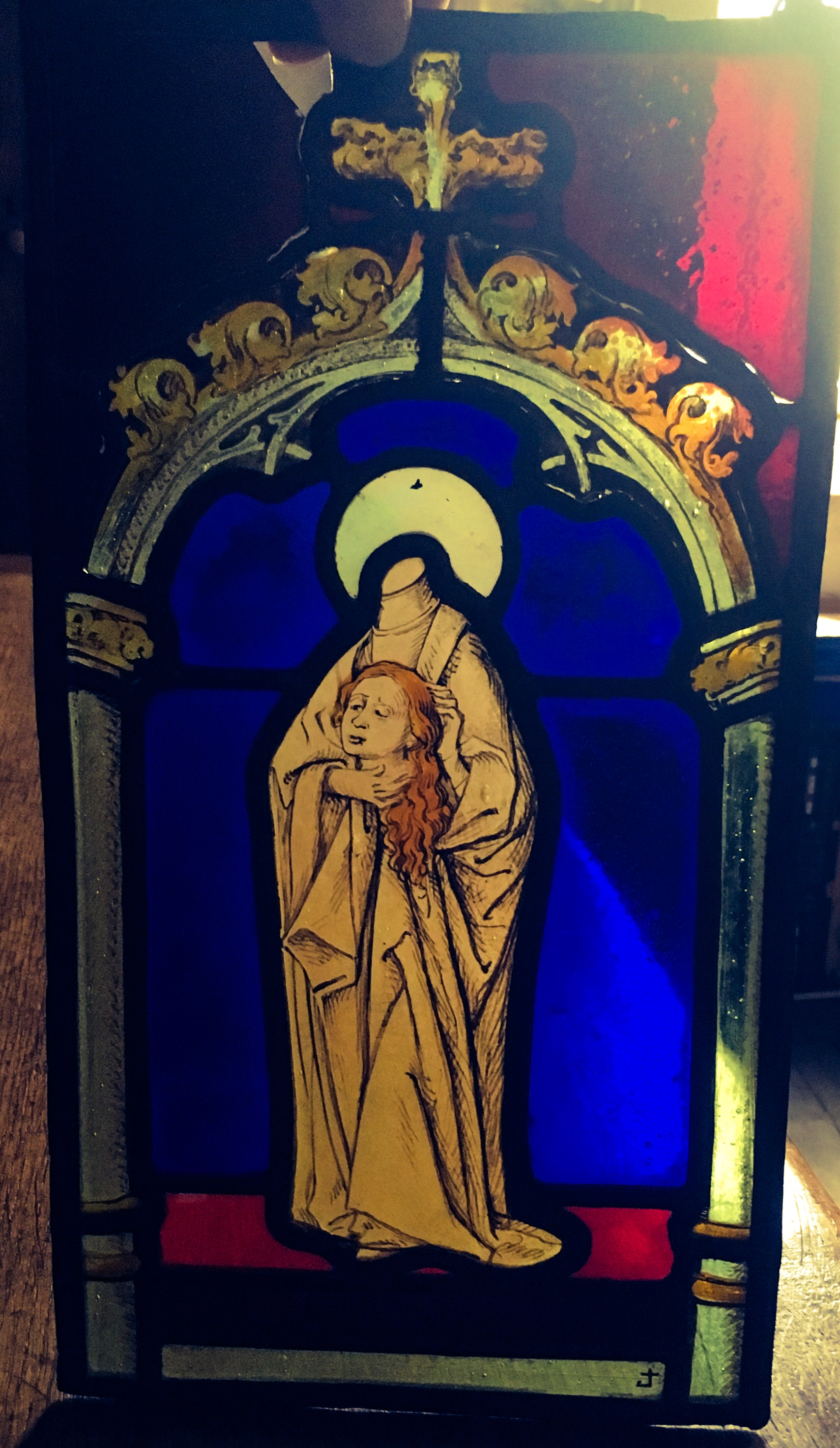 2ème moitié du 15ème siècle